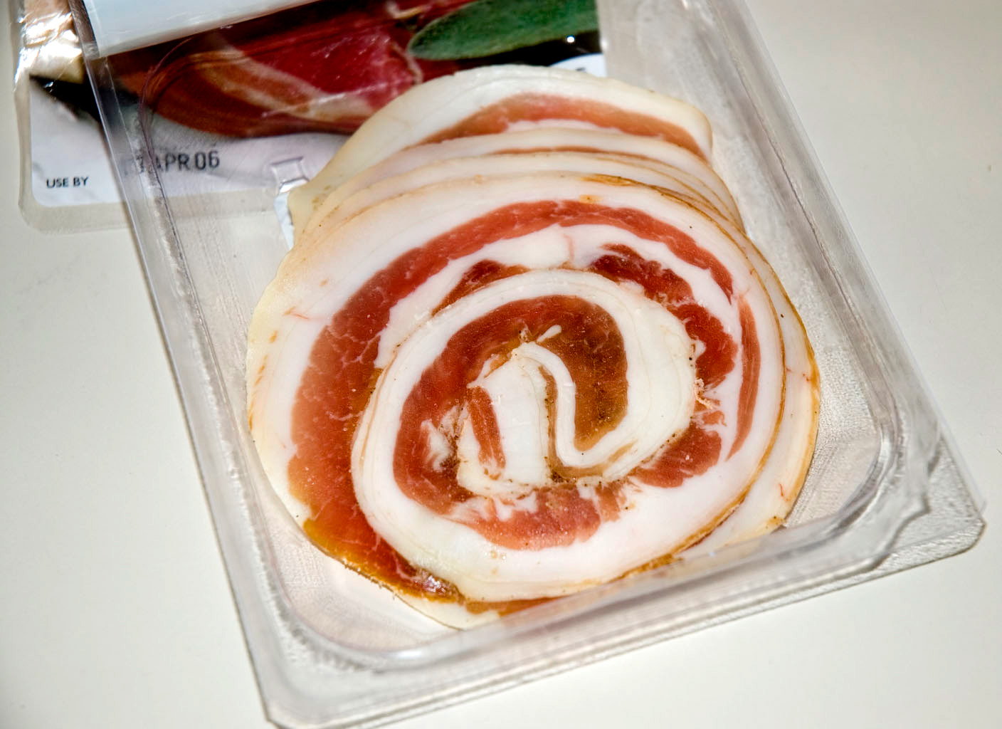 Packaged Pancetta.